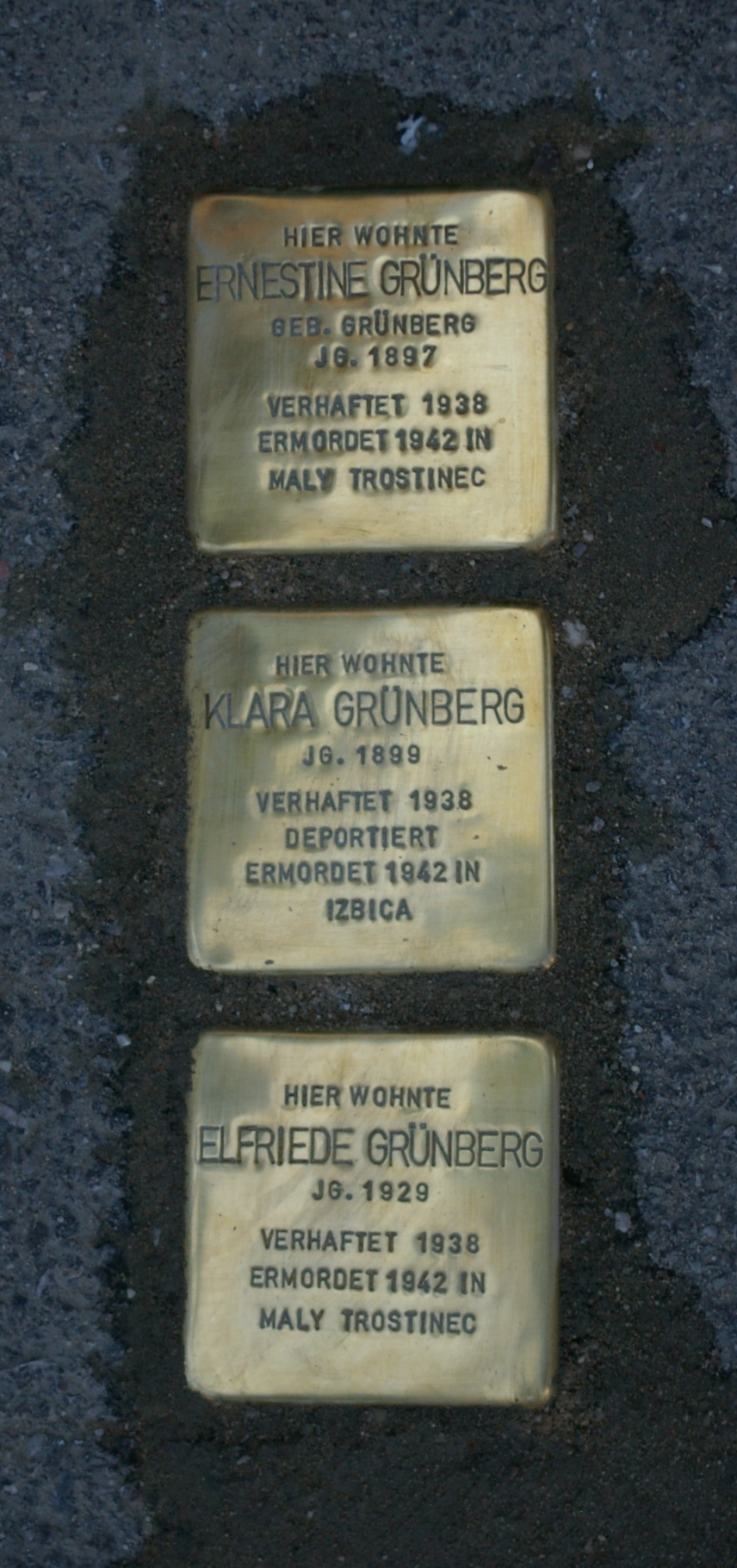 Stolpersteine in Wels in Erinnerung an Elfriede Grünberg und ihre Geschwister Ernestine und Klara